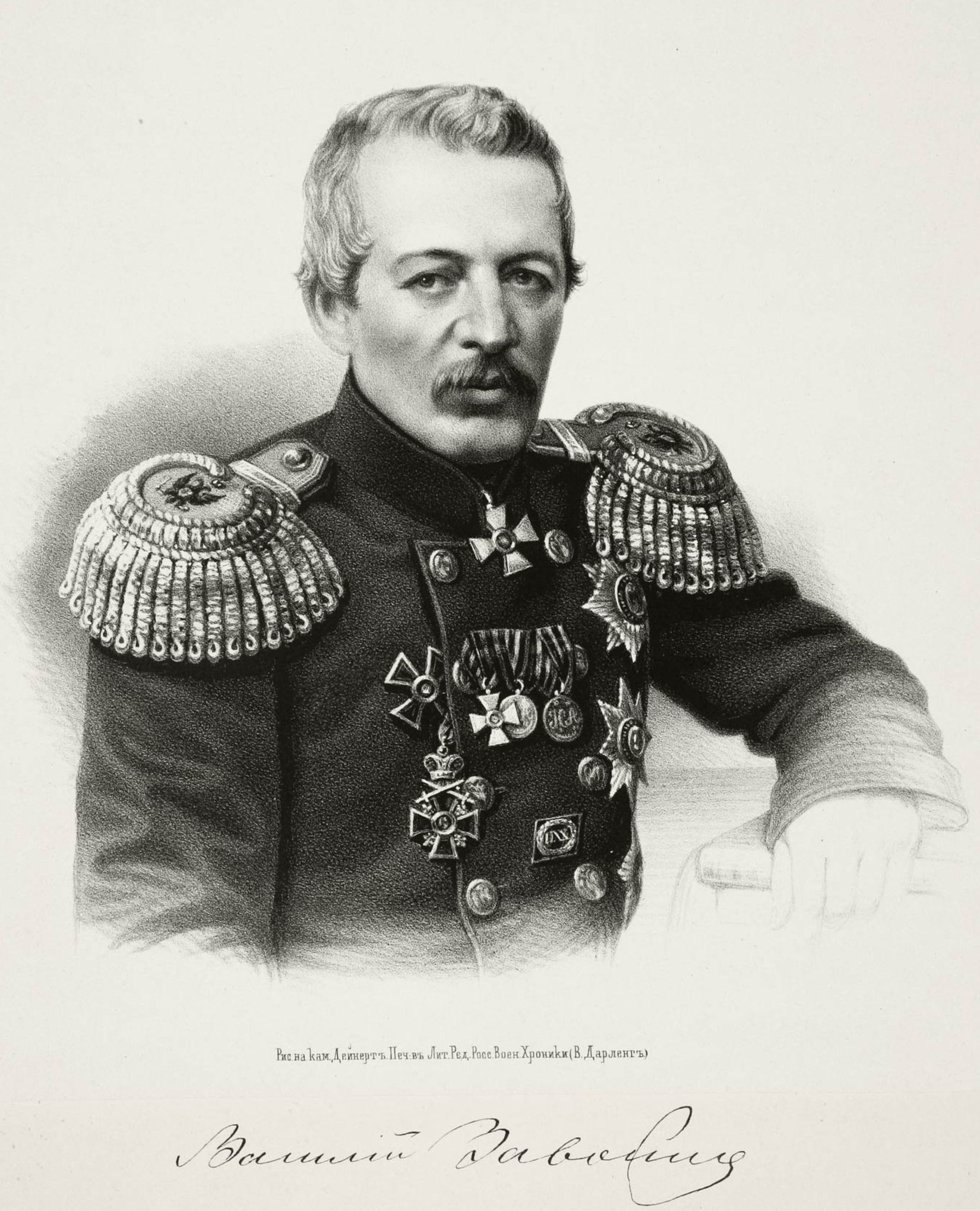 Завойко Василий Степанович(1812-1898), адмирал Российского императорского флота, участник Наваринского сражения, кругосветный мореплаватель, один из пионеров освоения Тихоокеанского побережья, первый военный губернатор Камчатки, организатор и руководитель обороны Петропавловска-Камчатского во время Крымской войны (1853—1856)